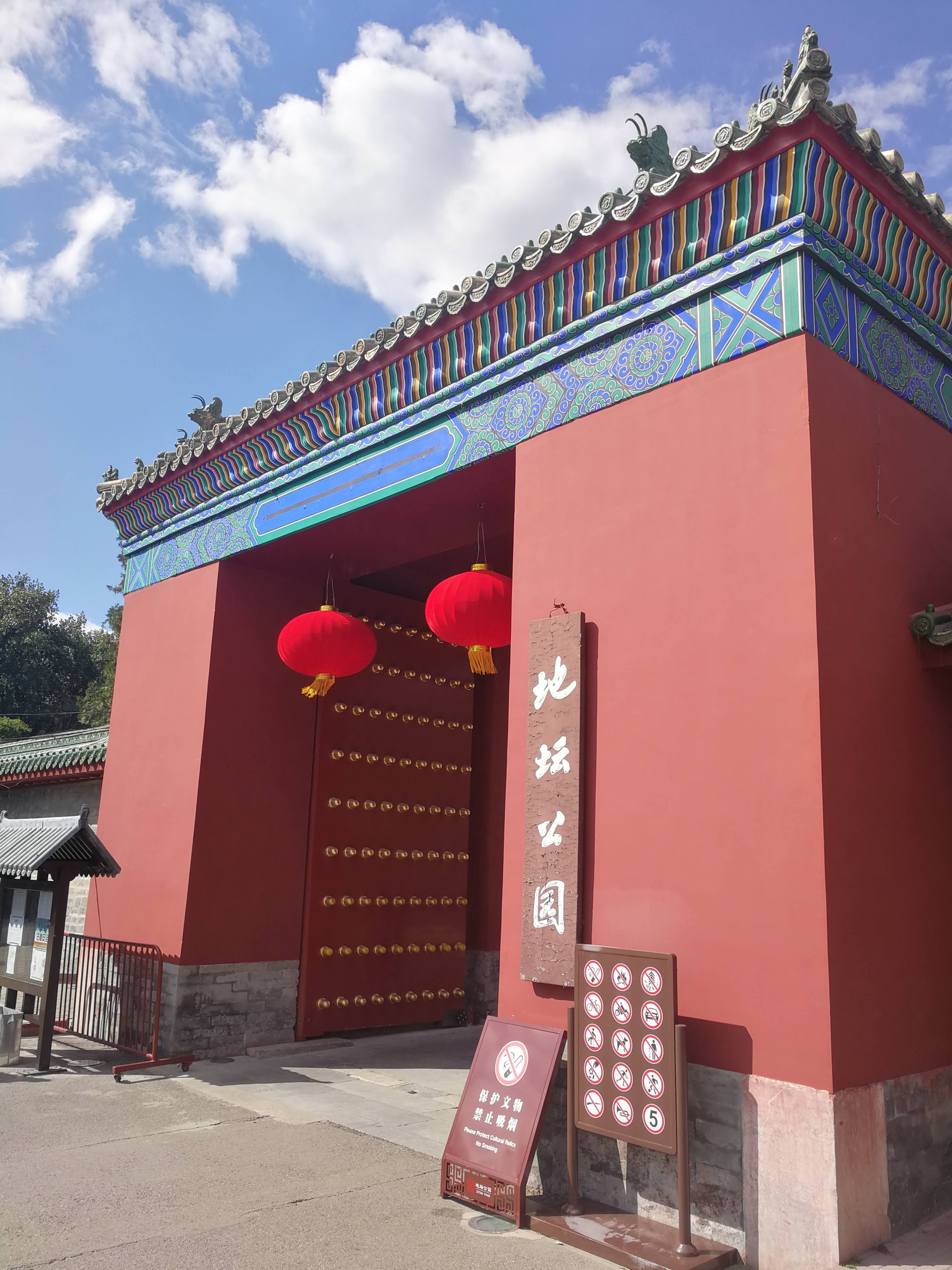 北京地坛公园南门